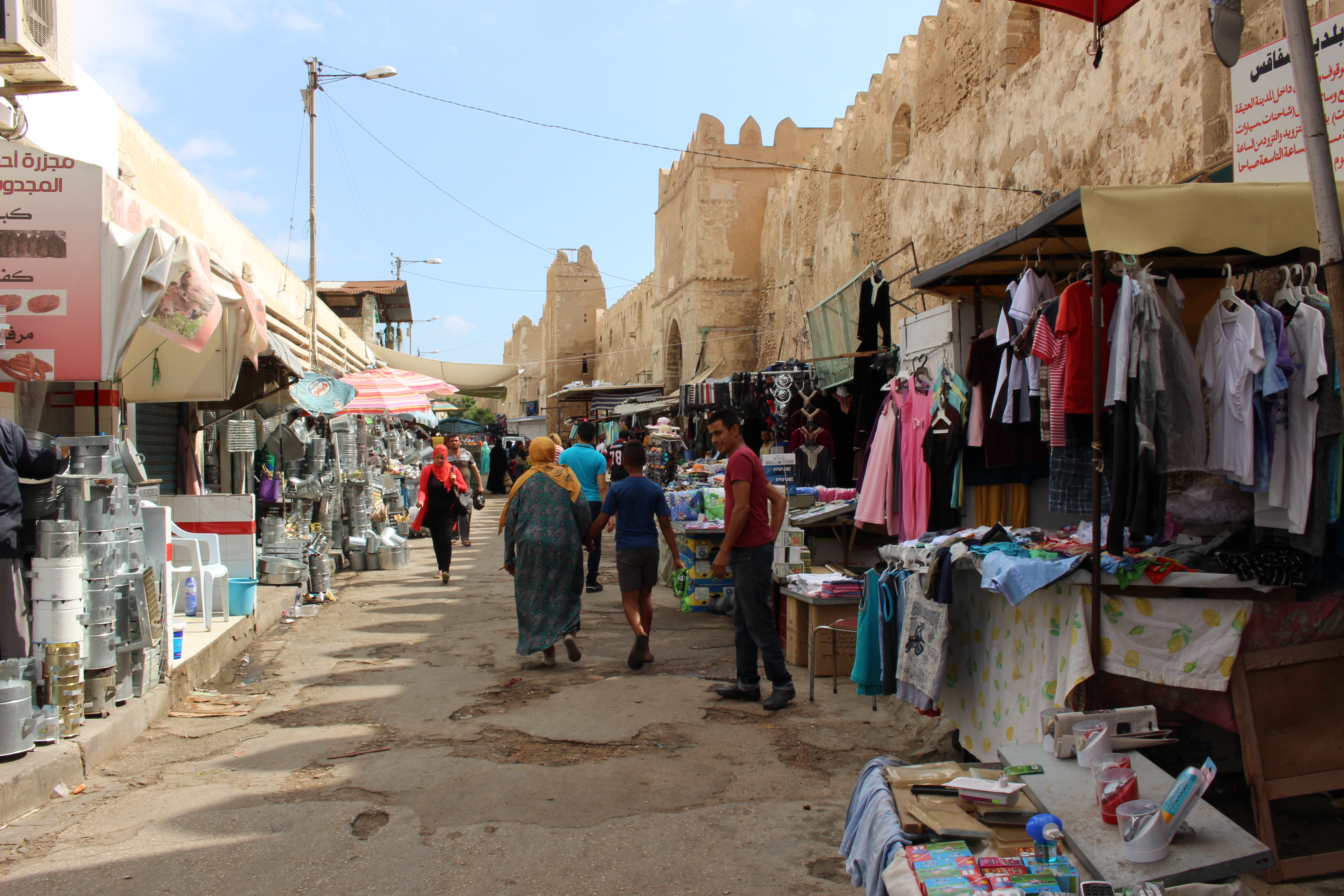 Remparts